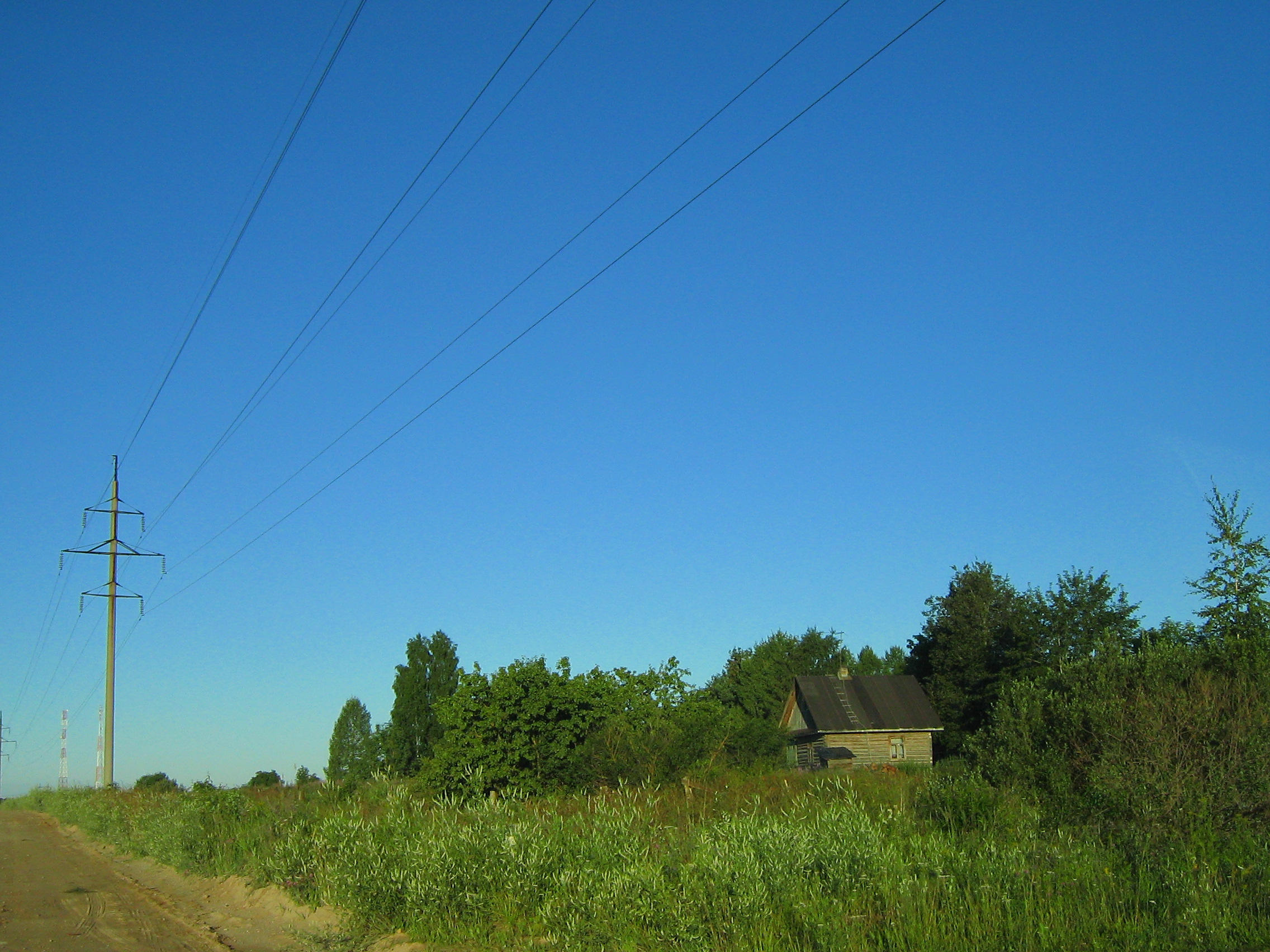 Посадников остров